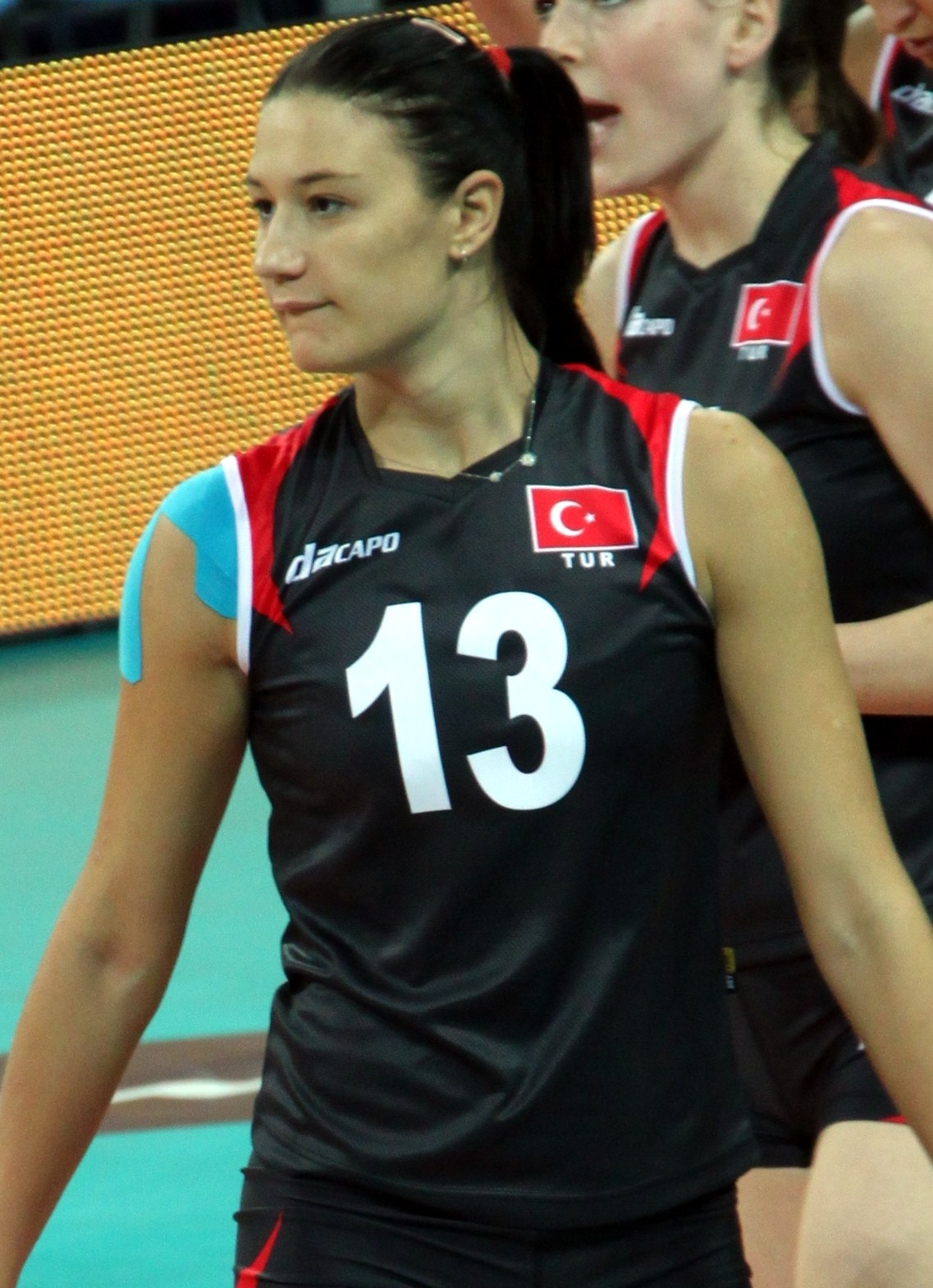 Turkish volleyball player Neriman Özsoy